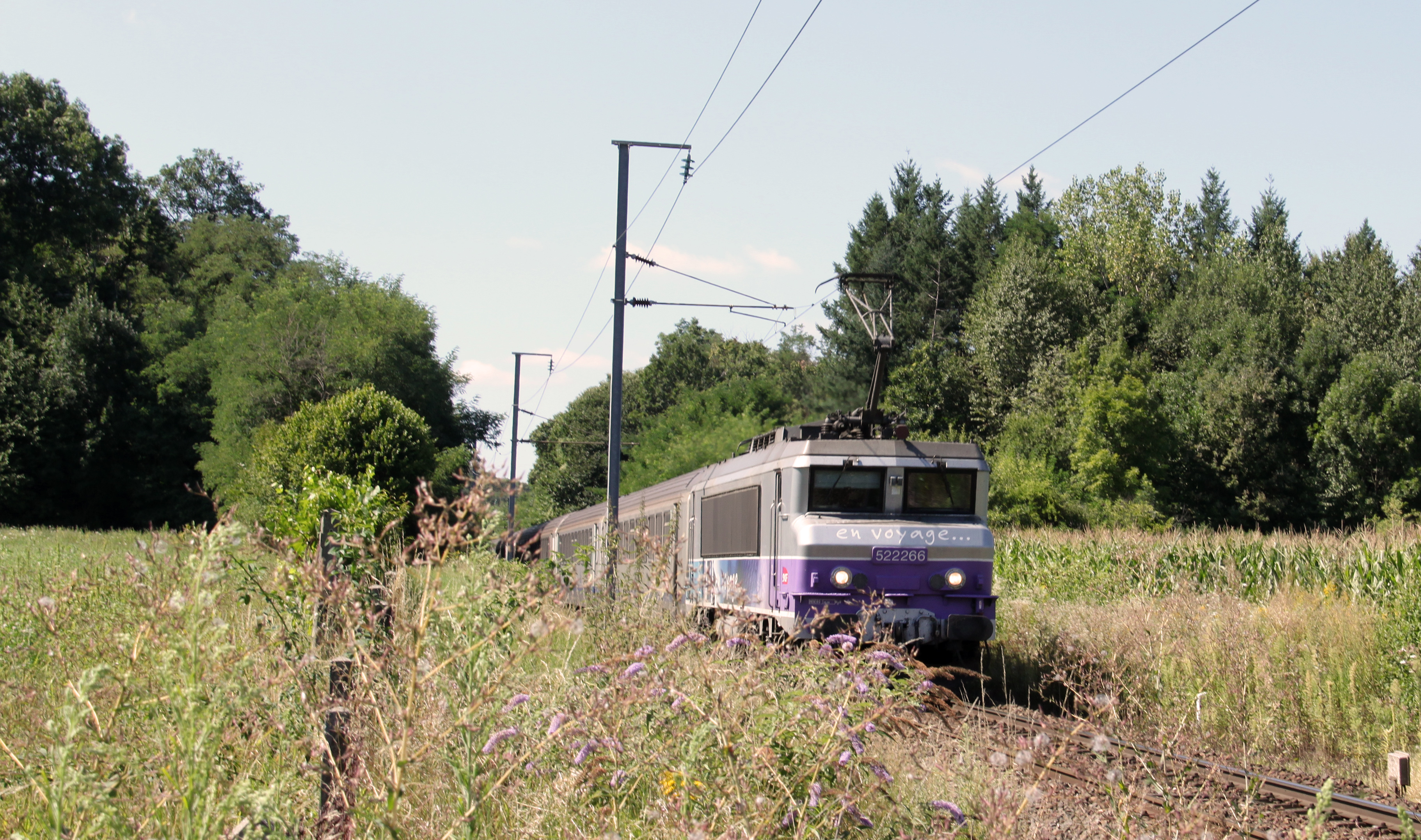 SNCF 522266 á Les Abrets, France.